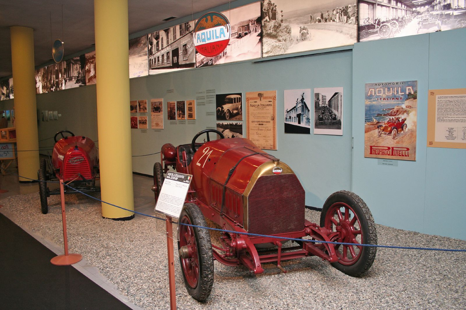 Aquila Italiana 25/30 HP (1912) at MUSEO DELL'AUTOMOBILE Torino